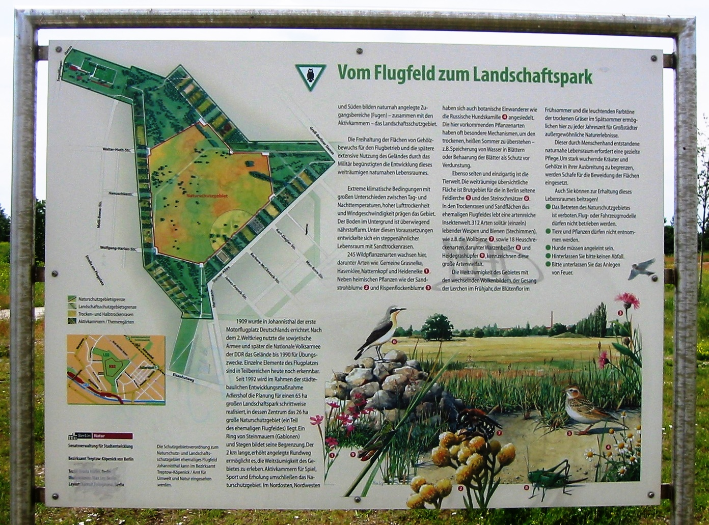 Übersichtskarte zum Landschaftspark Johannisthal/Adlershof (ehemaliges Flugfeld) in Berlin-Johannisthal und Adlershof – Bereich des LSG 48 „Ehemaliges Flugfeld Johannisthal“, darin Zentralfläche NSG 35 „Ehemaliges Flugfeld Johannisthal“